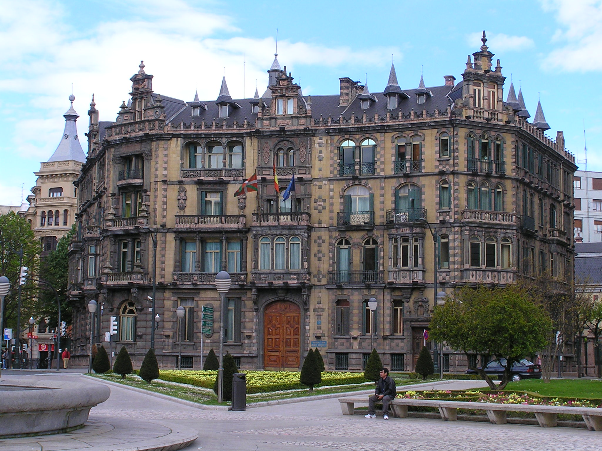 Txabarri jauregia, Bilbo. Bizkaia, Euskal Herria. Txabarri palace, Bilbo. Bizkaia, Euskal Herria.